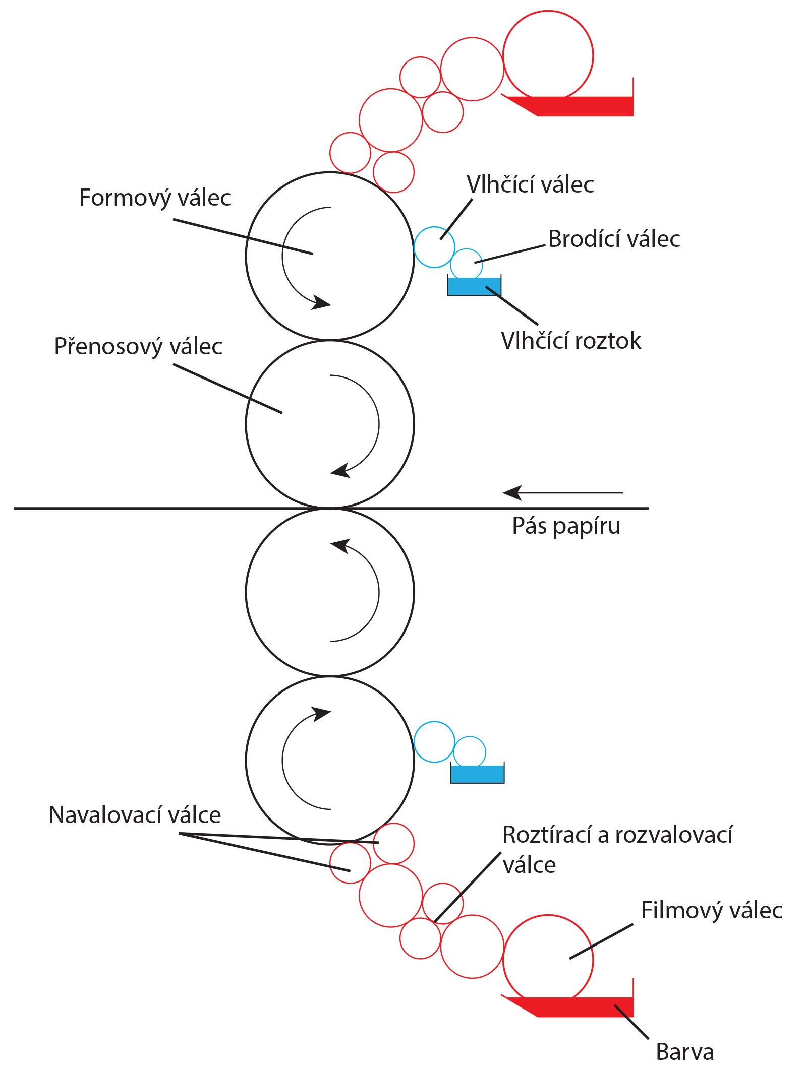 Schéma jedné tiskové jednotky kotoučového ofsetového tisku. Na schematu jsou zobrazeny formový a přenosový válce s barevníkem a vlhčícím zařízením.